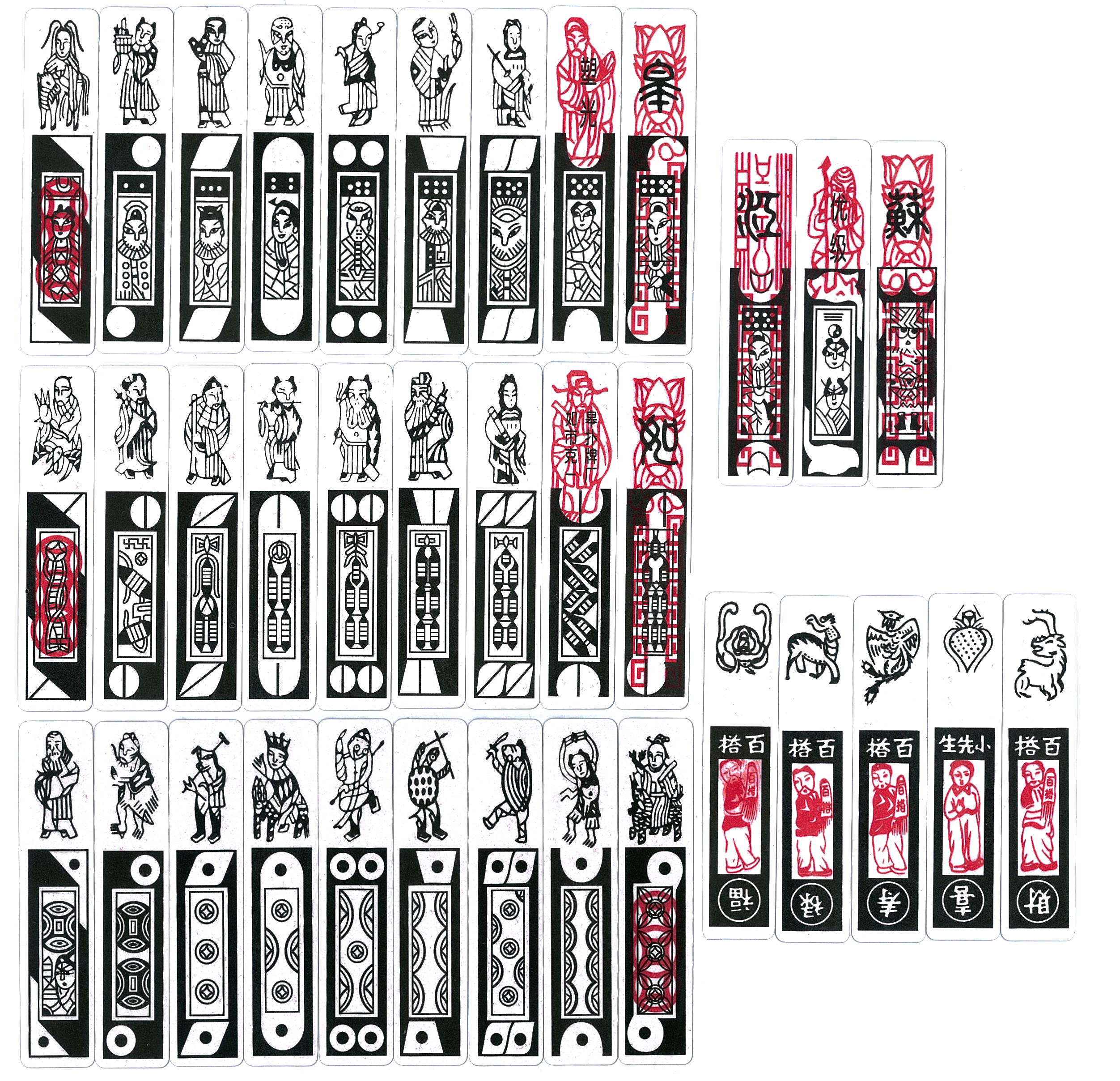 中文（台灣）: 如皋的南通長牌